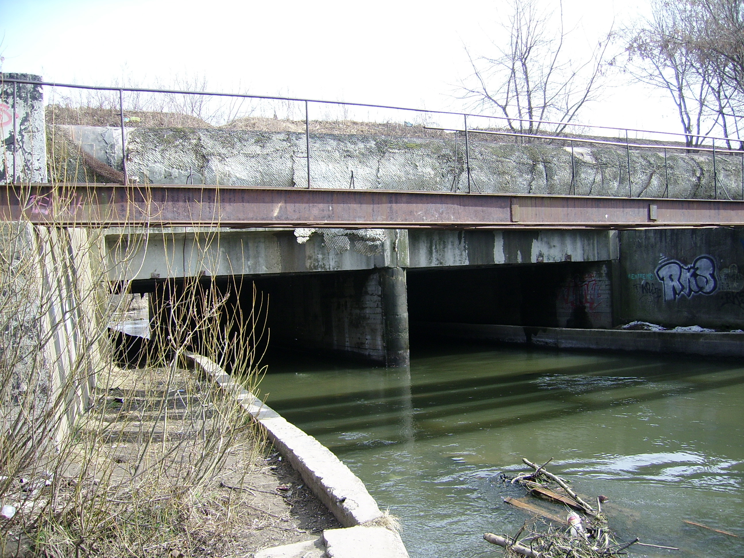 Медведковский метромост в Москве